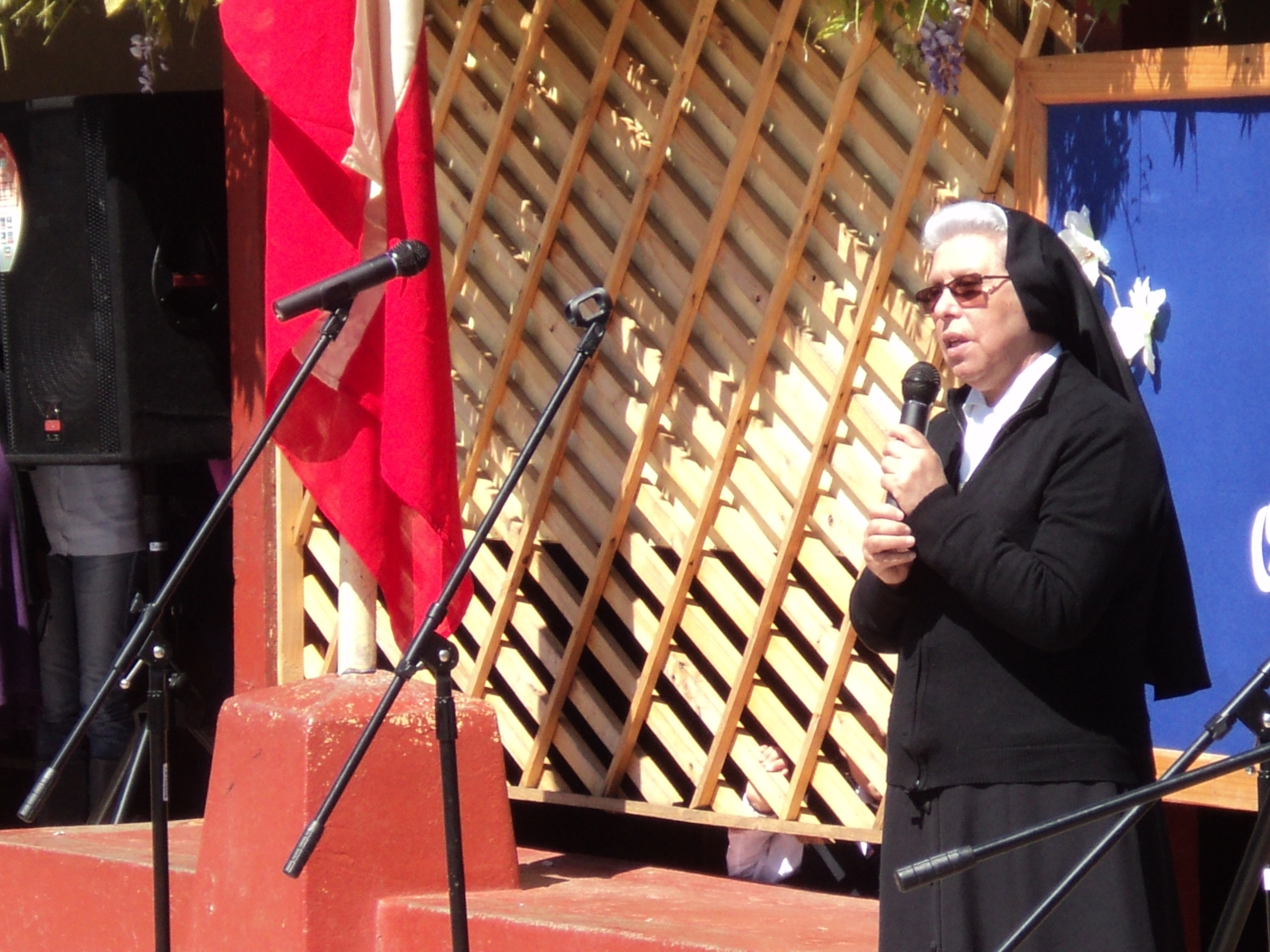 Madre Loreto Fuentes Parra, madre superiora de la Congregación de hermanas de la Preciosa Sangre, en la ceremonia de despedida como directora del colegio de la Preciosa Sangre de Pichilemu.